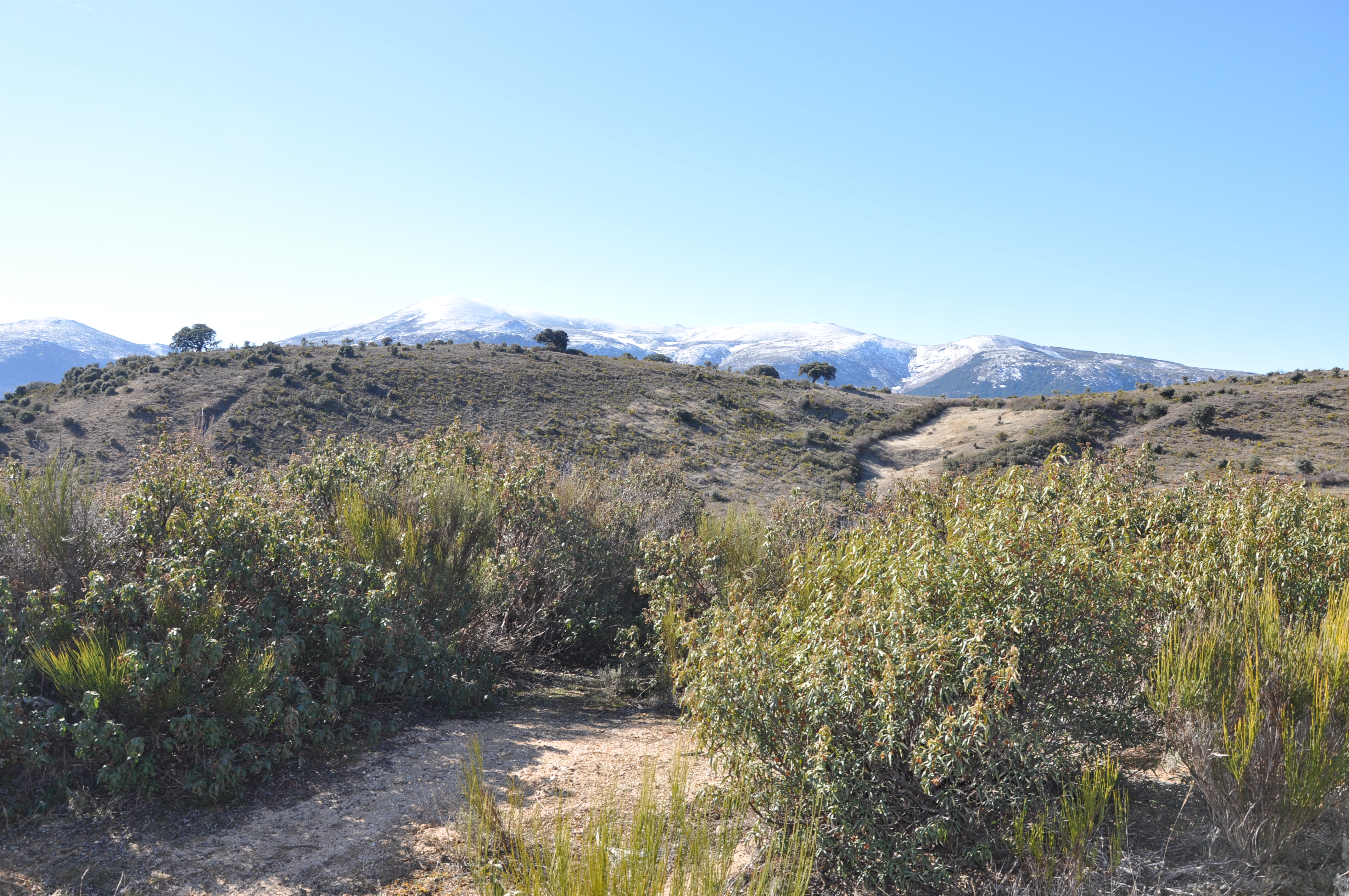 Matorral de estepa negral (Cistus laurifolius) y escobas (Cytisus scoparius), Amavida, Ávila, España.